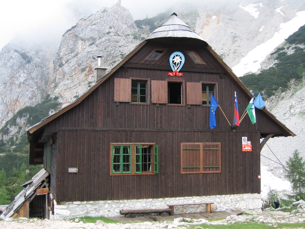 Ceska koca na Spodnjih Ravneh